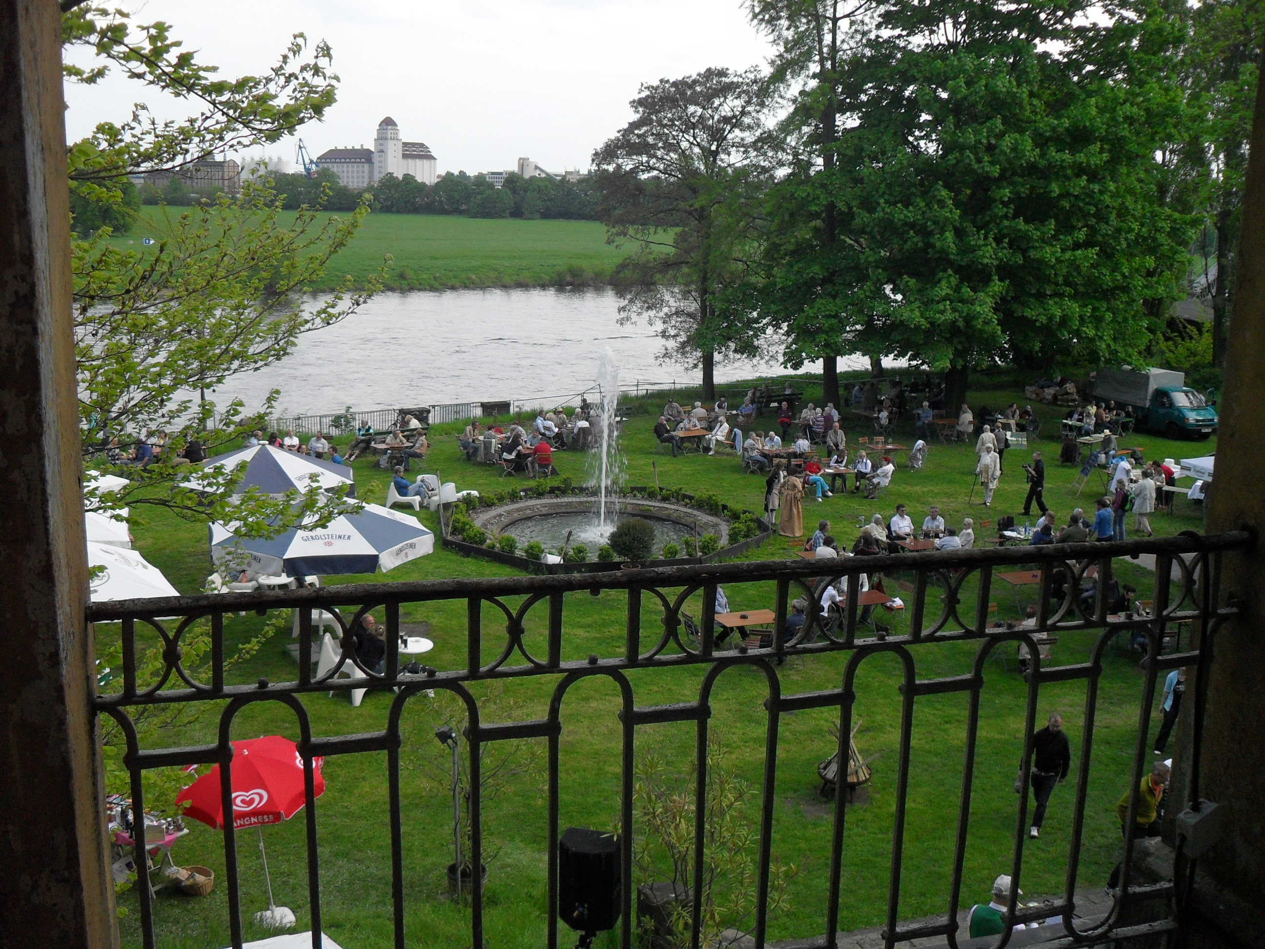 Garten von Schloss Übigau, vom Balkon aus aufgenommen. Blick über die Elbe zur Bienertschen Hafenmühle.